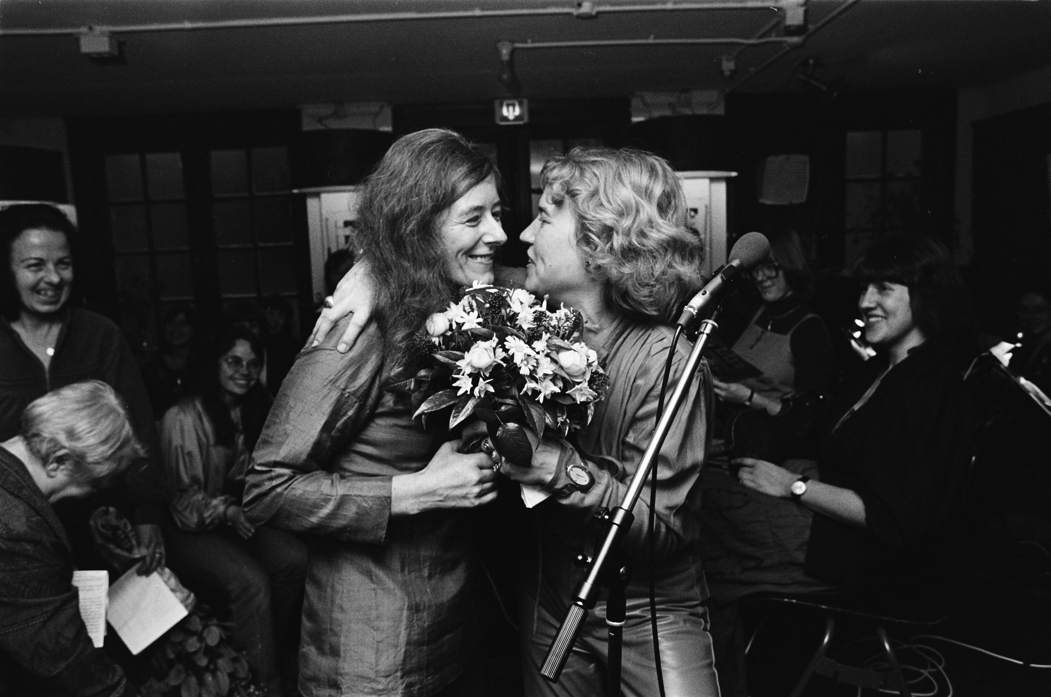 Joke Kool-Smit ontvangt Annie Romein-Verschoorpirijs uit handen van Anneke Reuvekamp. (Amsterdam, Nederland)